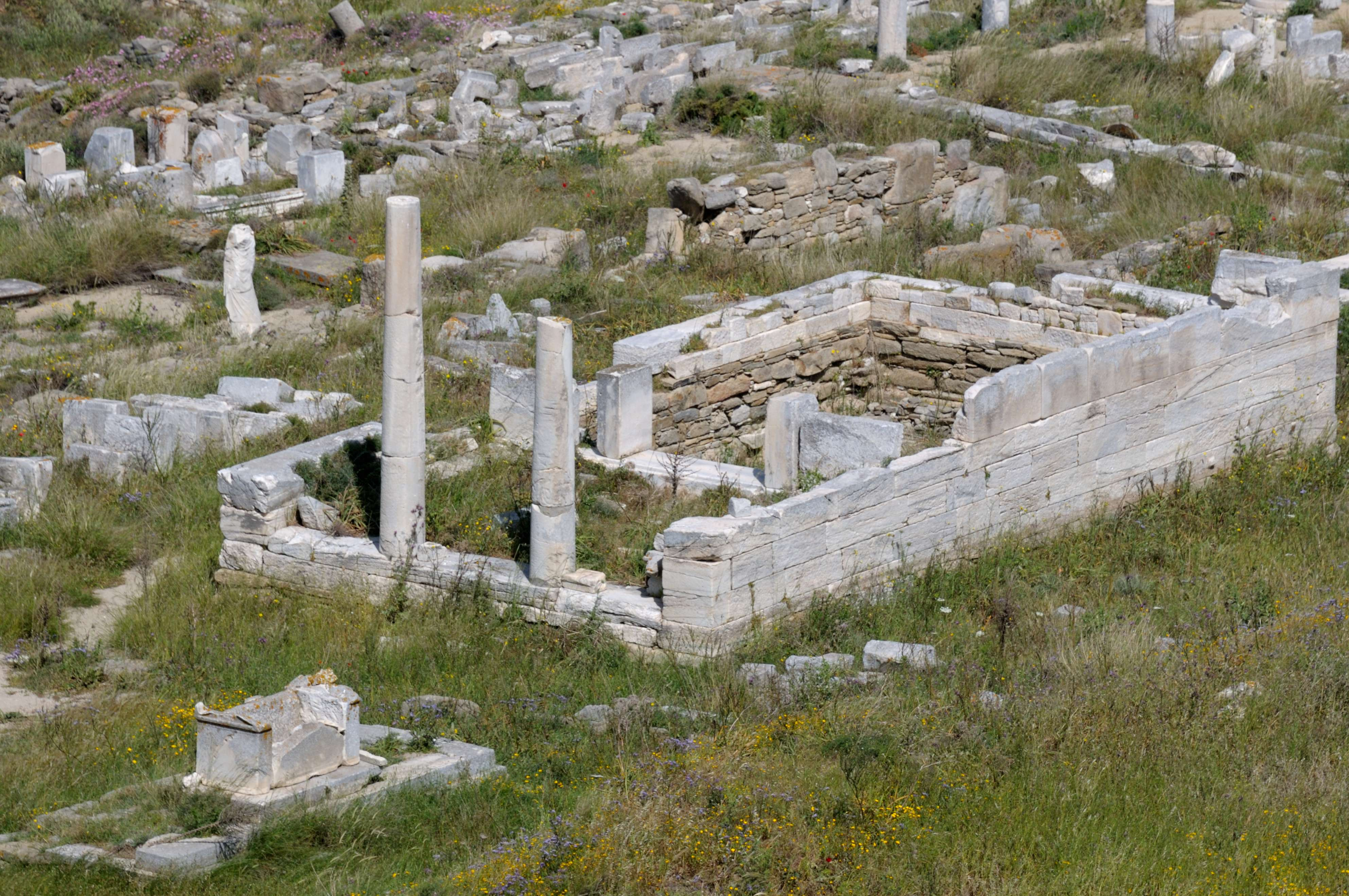 Dernier état du temple d'Héra à Délos, vu du Sud, en hauteur depuis le Cynthe.